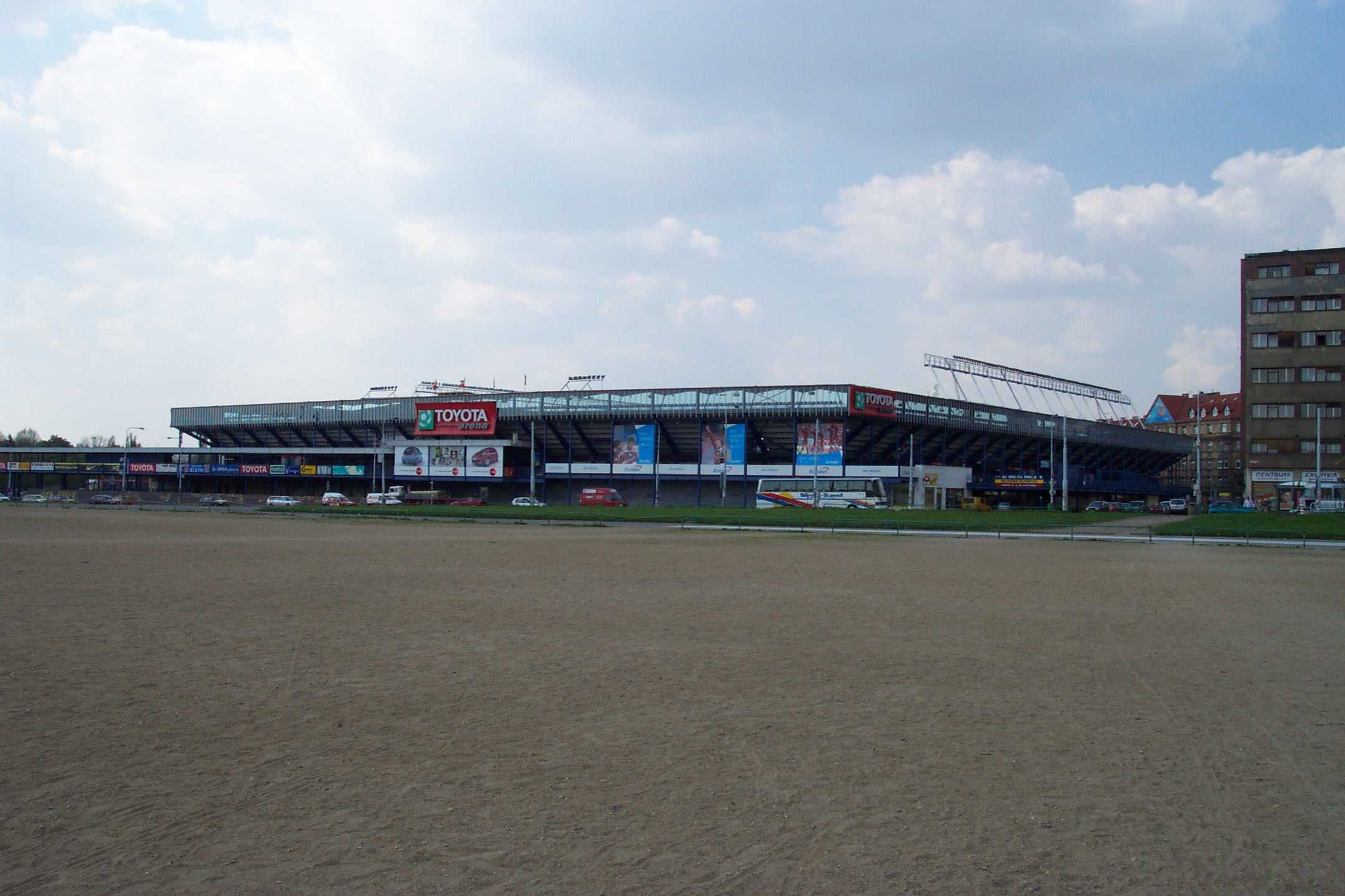 Toyota Arena in Prague - Toyota Arena v Praze